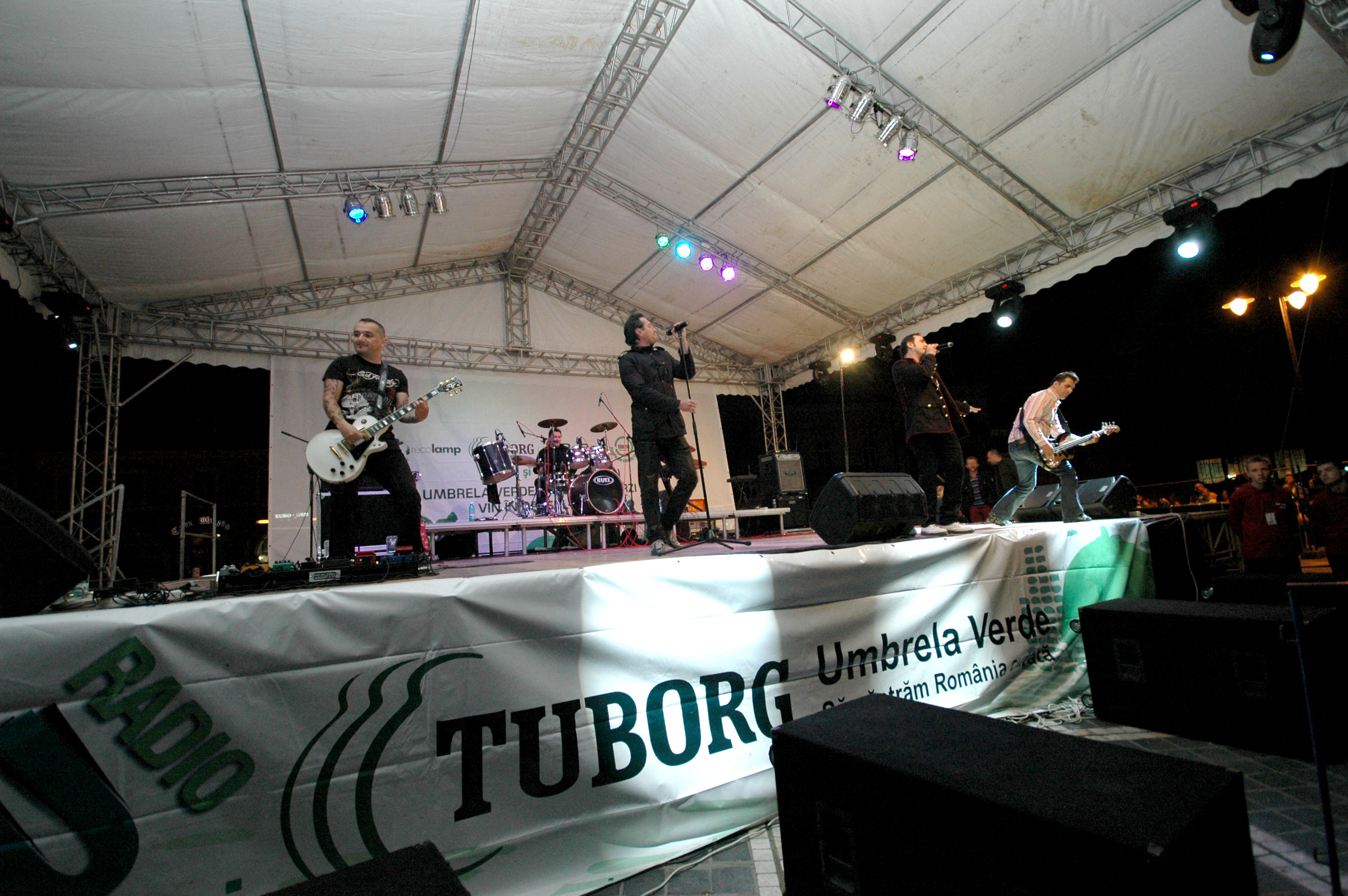 In a 3-a zi de campanie, au cantat Directia 5 alaturi de Toni Seicarescu.